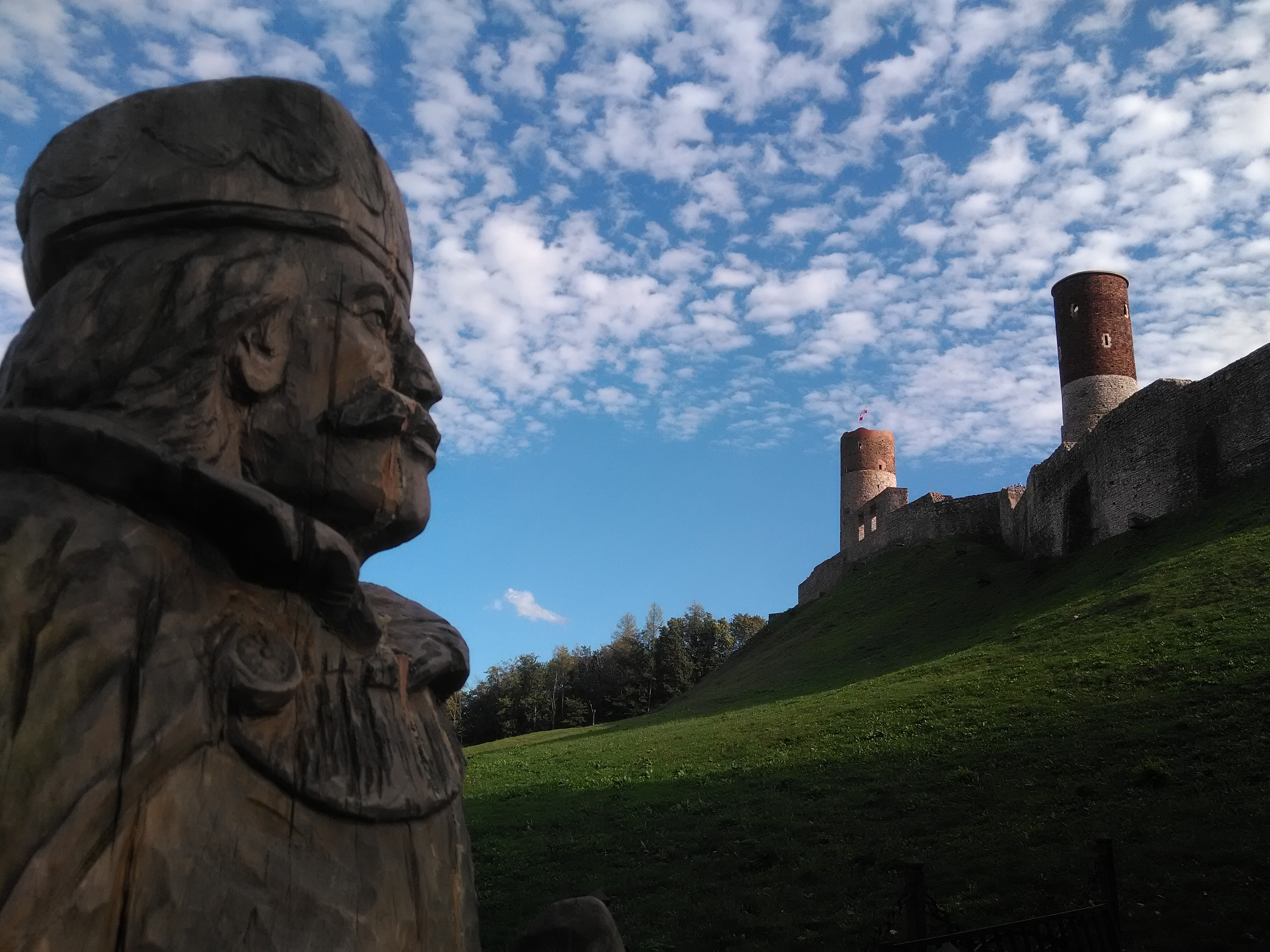 Chęciny, Zamek w Chęcinach Wikidata has entry Q4497261 with data related to this item.